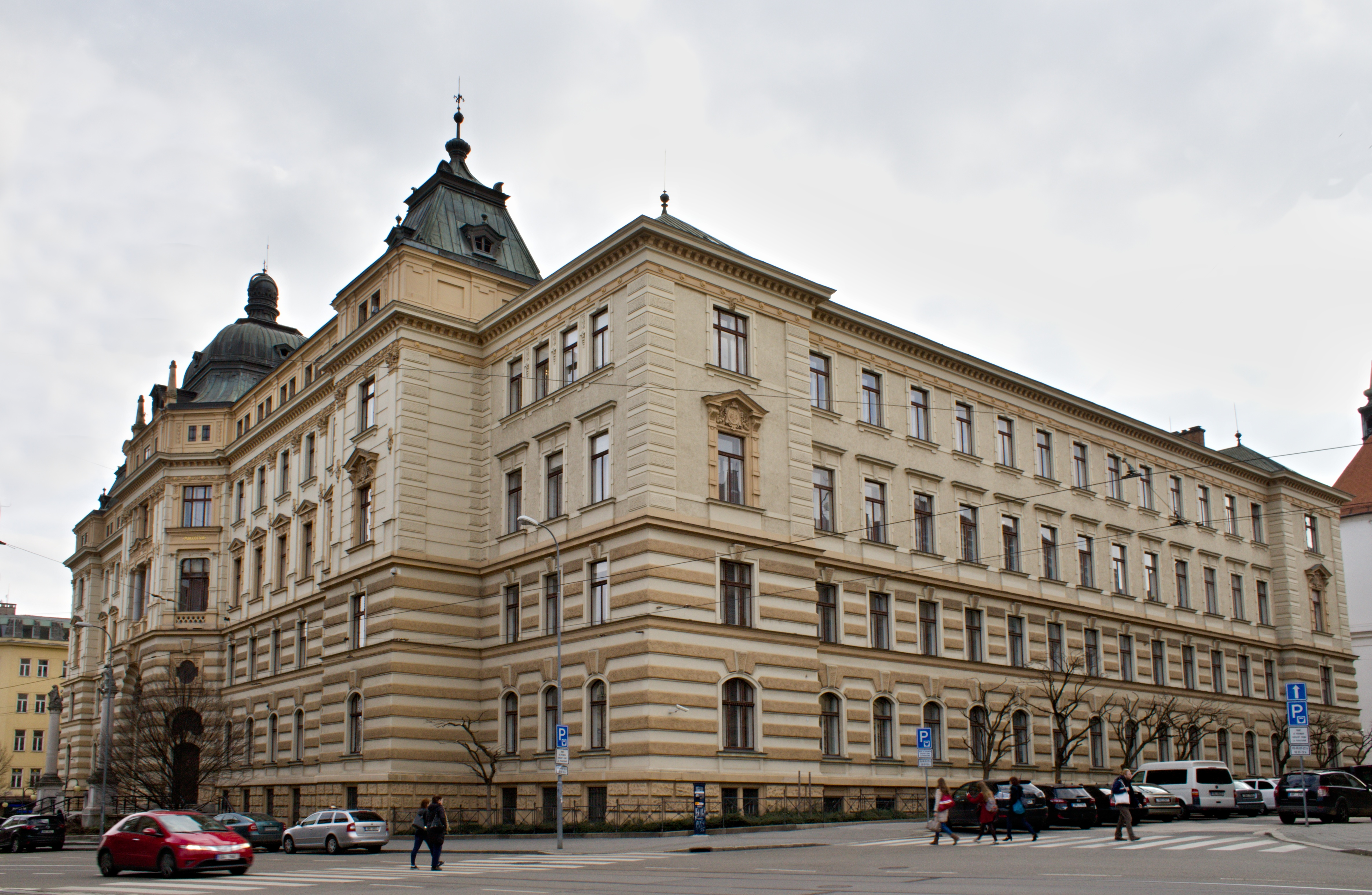 Brno, Justiční palác